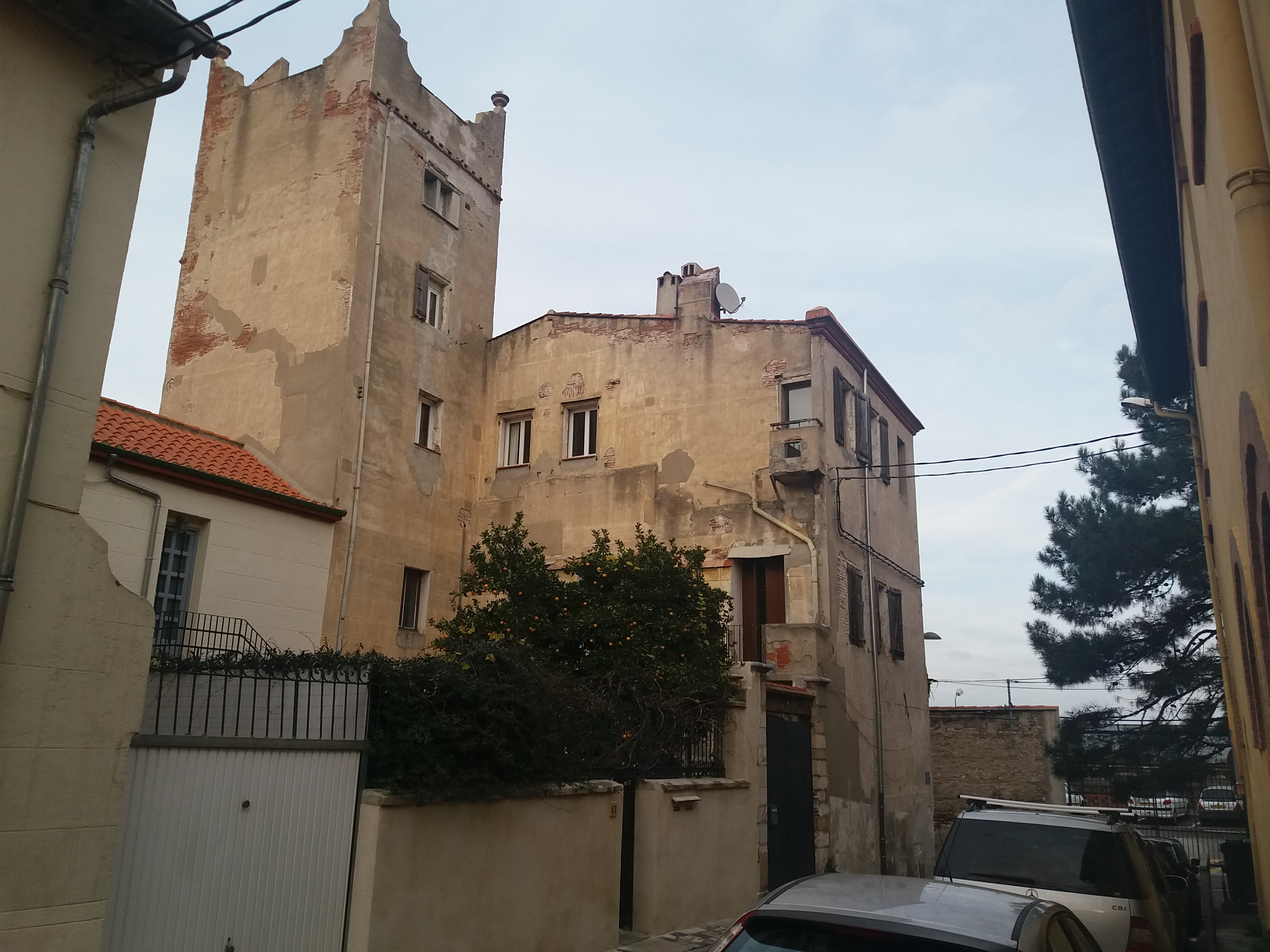 Restes del convent de frares carmelites descalços de Perpinyà